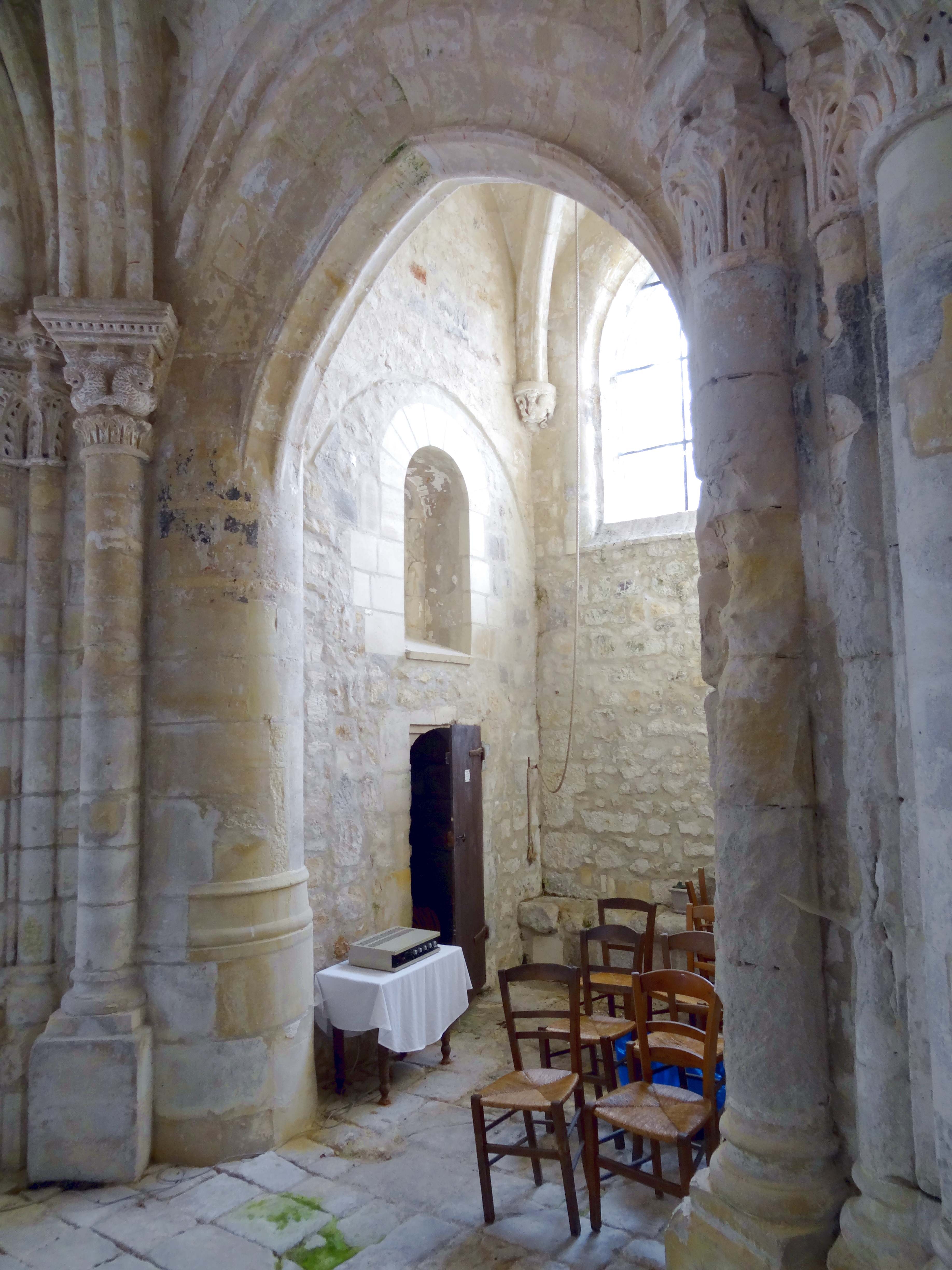 Intérieur de l'église - voir titre.